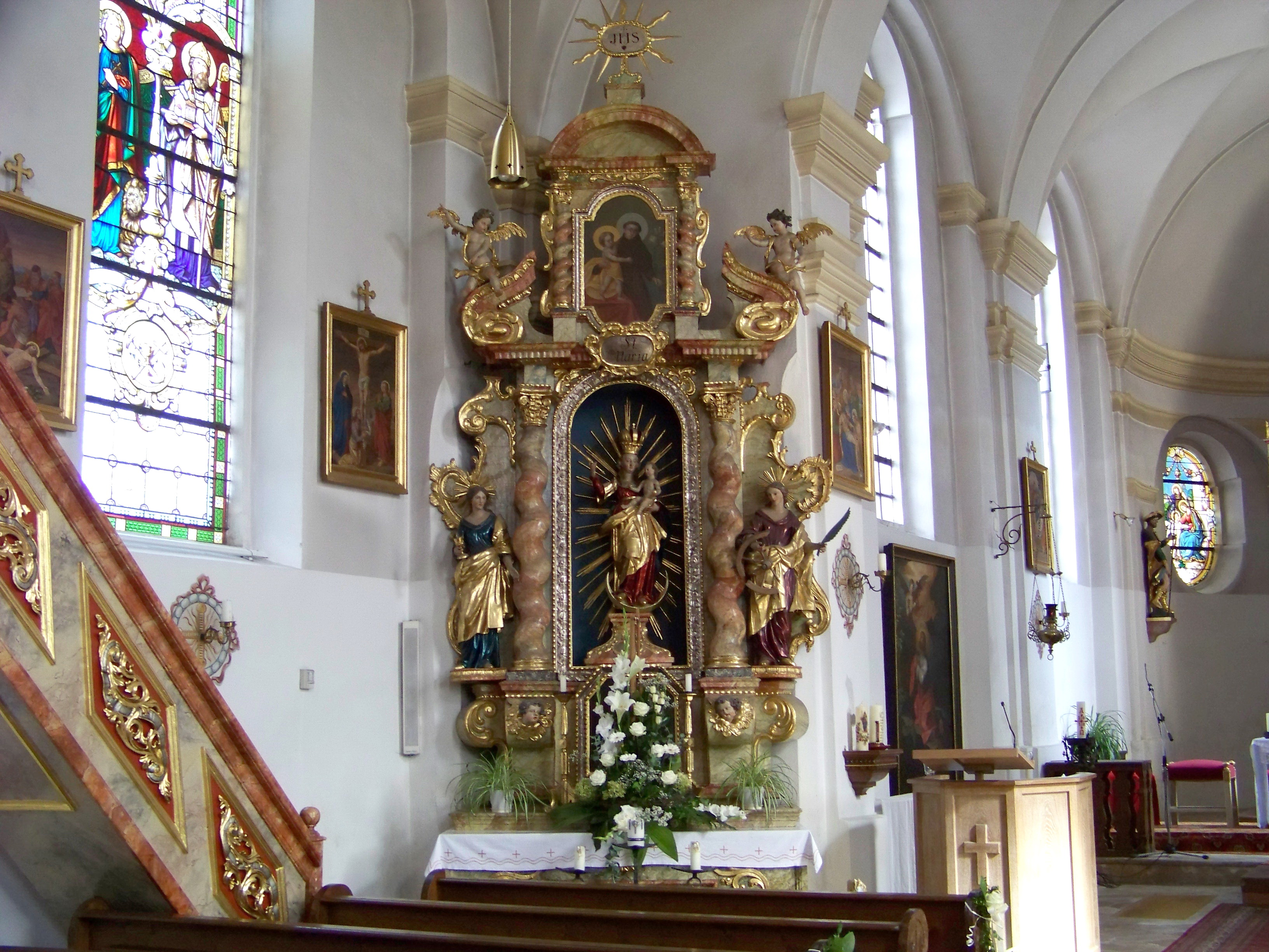 Weihmichl, Hauptstraße 24. Pfarrkirche St. Willibald. Saalkirche mit eingezogenem Chor, Langhaus und Chor barock. Linker Seitenaltar St. Maria um 1725 mit zwei gewundenen Säulen.